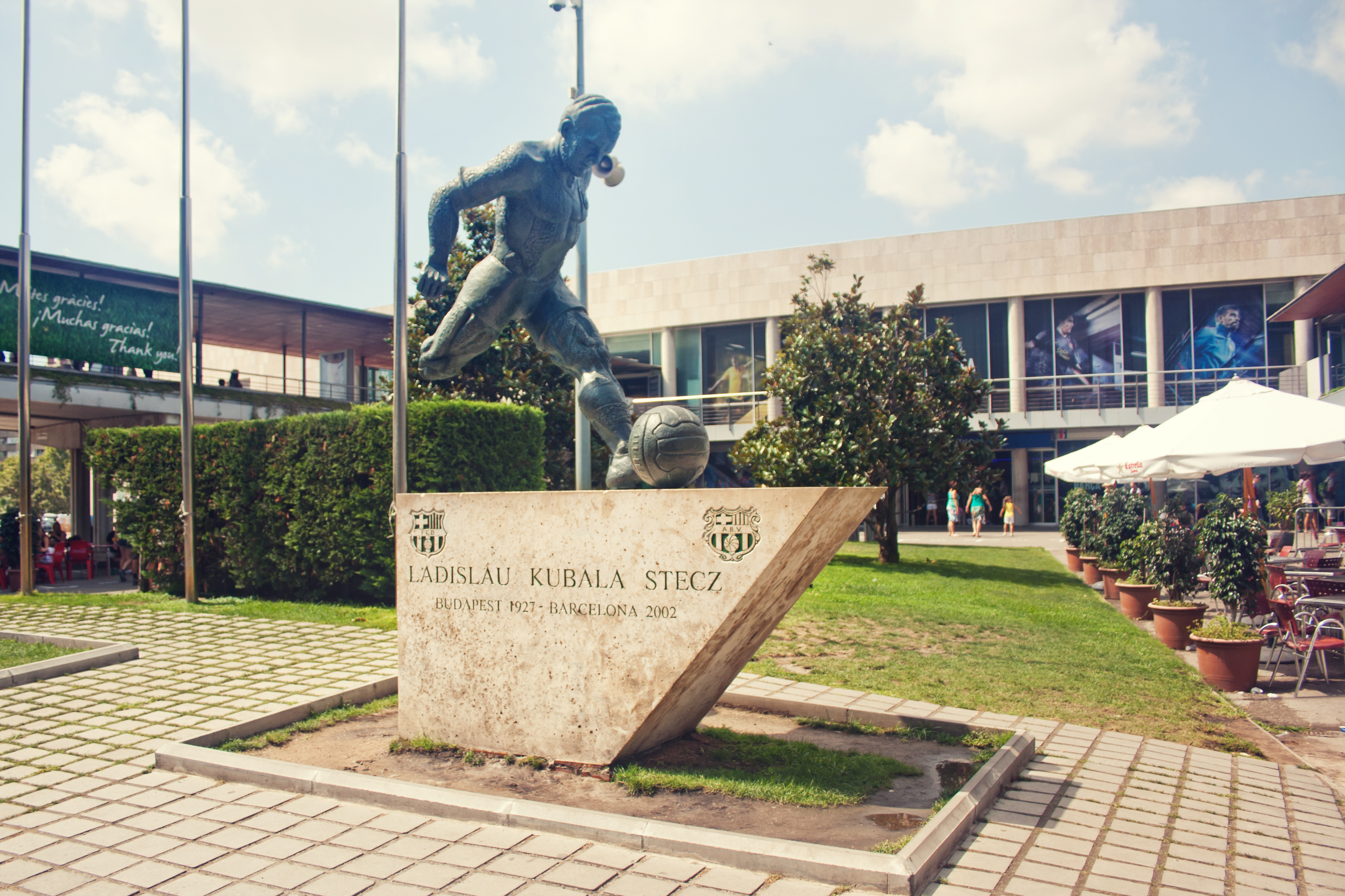 Barcelona, España